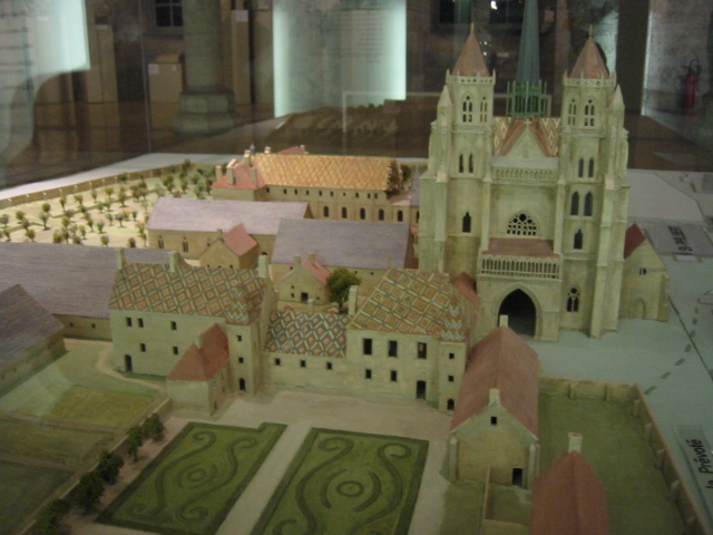 Maquette de l'ancienne abbaye Saint-Bénigne de Dijon au musée archéologique de Dijon